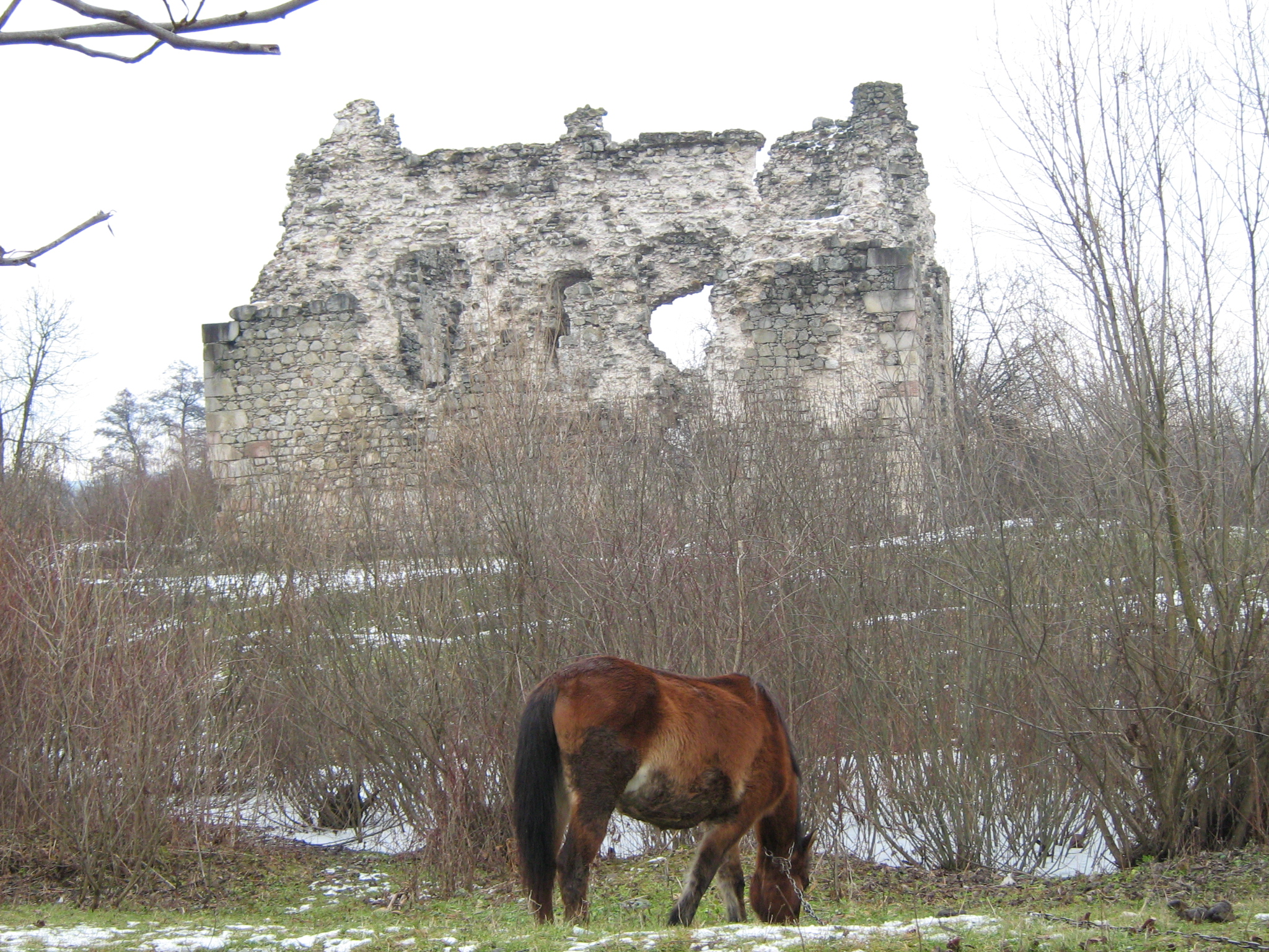 Замок (мур.), смт.Середнє